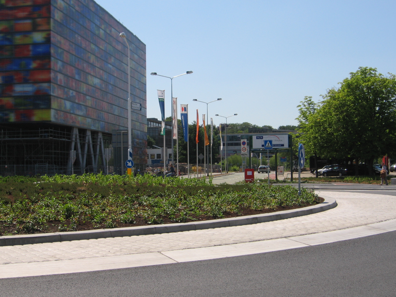 Ingang Mediapark Hilversum, juni 2006